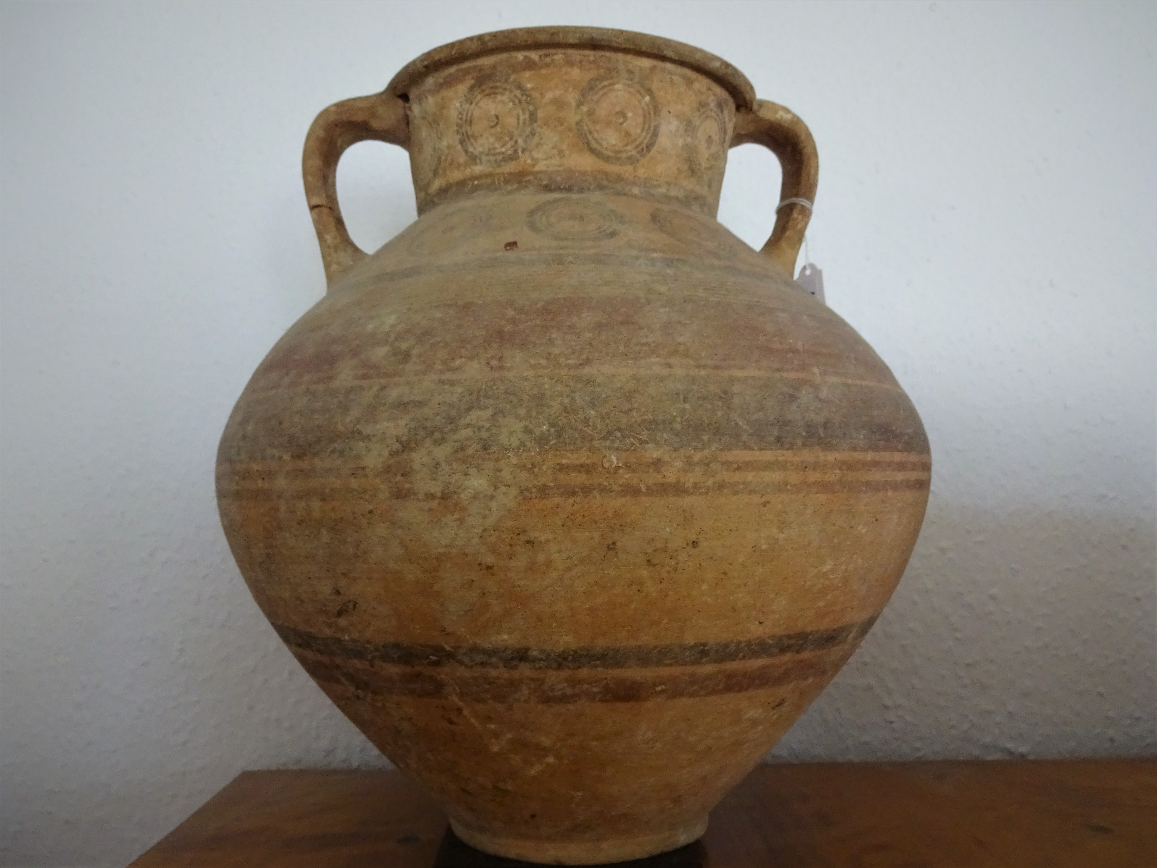 Amphora aus dem östlichen Mittelmeerraum, bichrome Ware, 750 bis 600 v. Chr, 33,2 cm hoch, Gorny und Mosch, 268. Auktion, Dezember 2019, Los 33